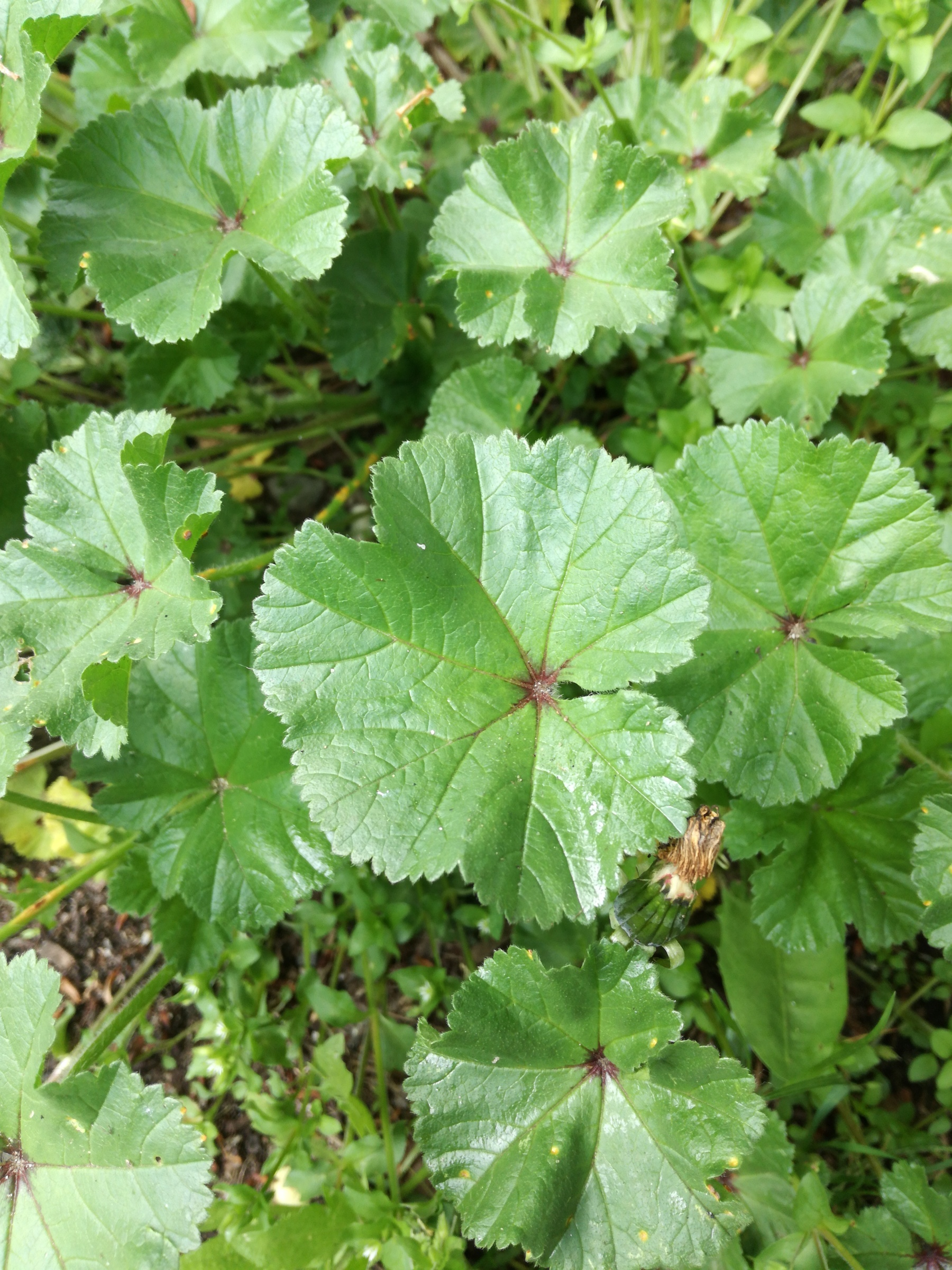 Ślaz dziki